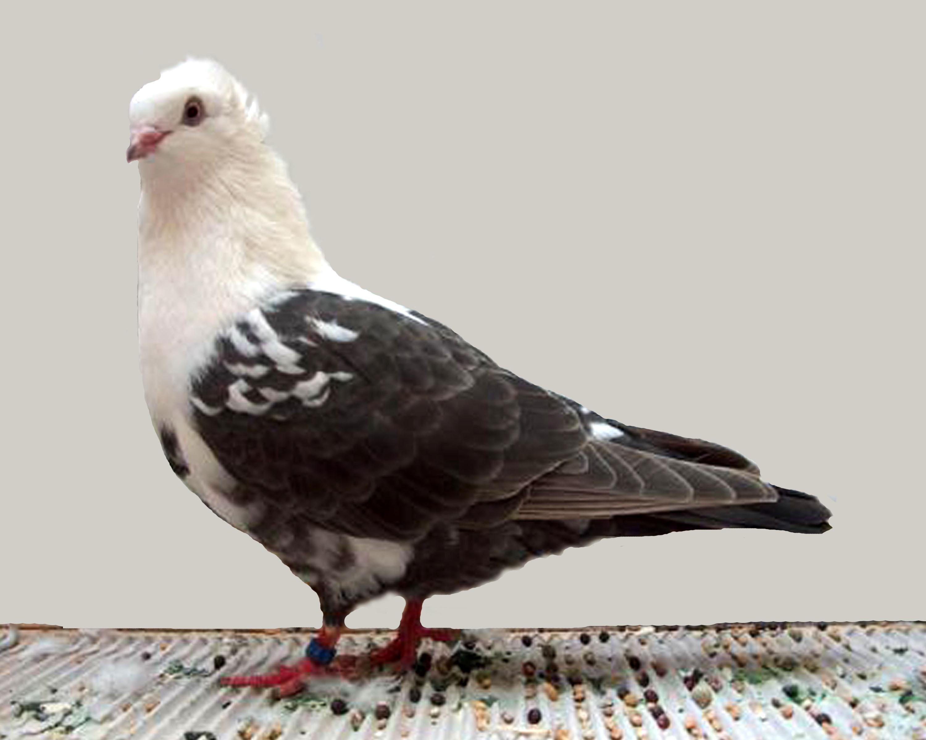 Timisoara Tumbler (Dun)